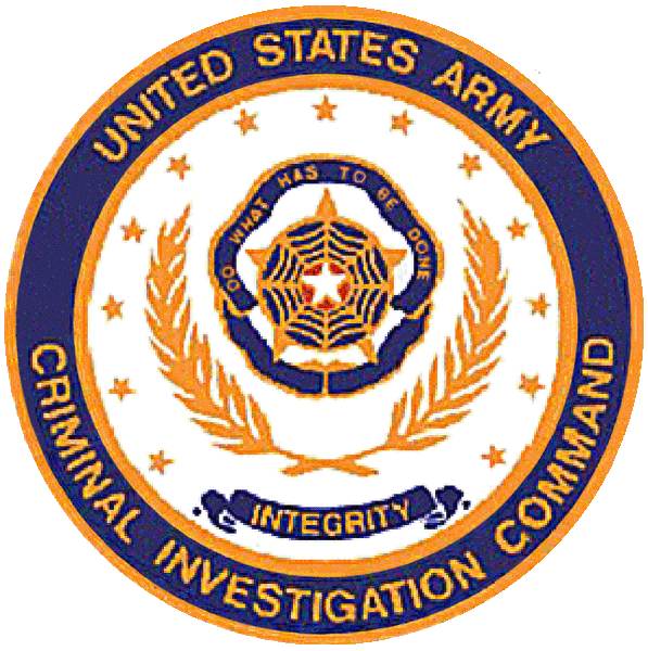 CIC-Abzeichen.